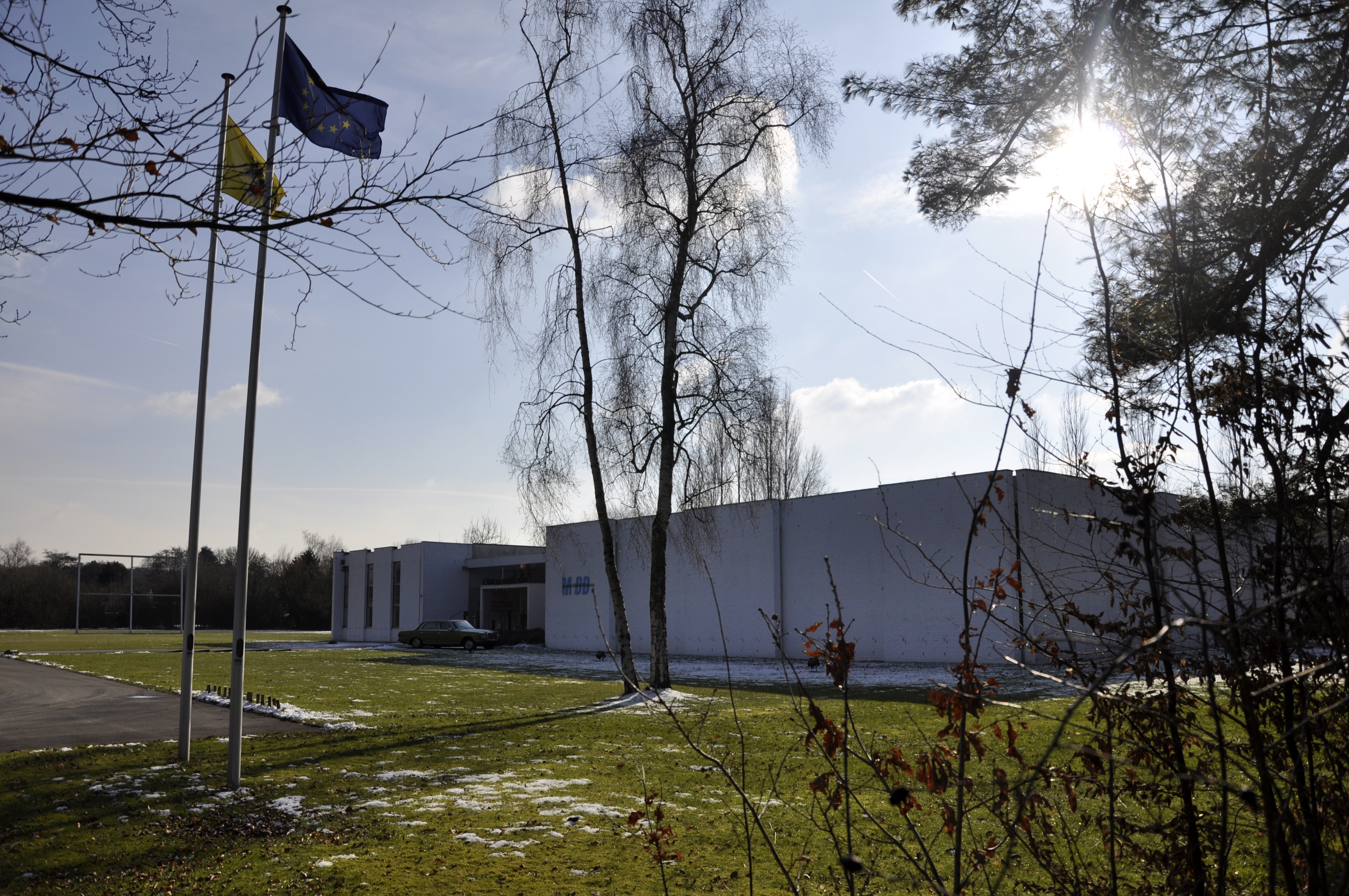 Het museum Dhondt-Dhaenens te Deurle, België